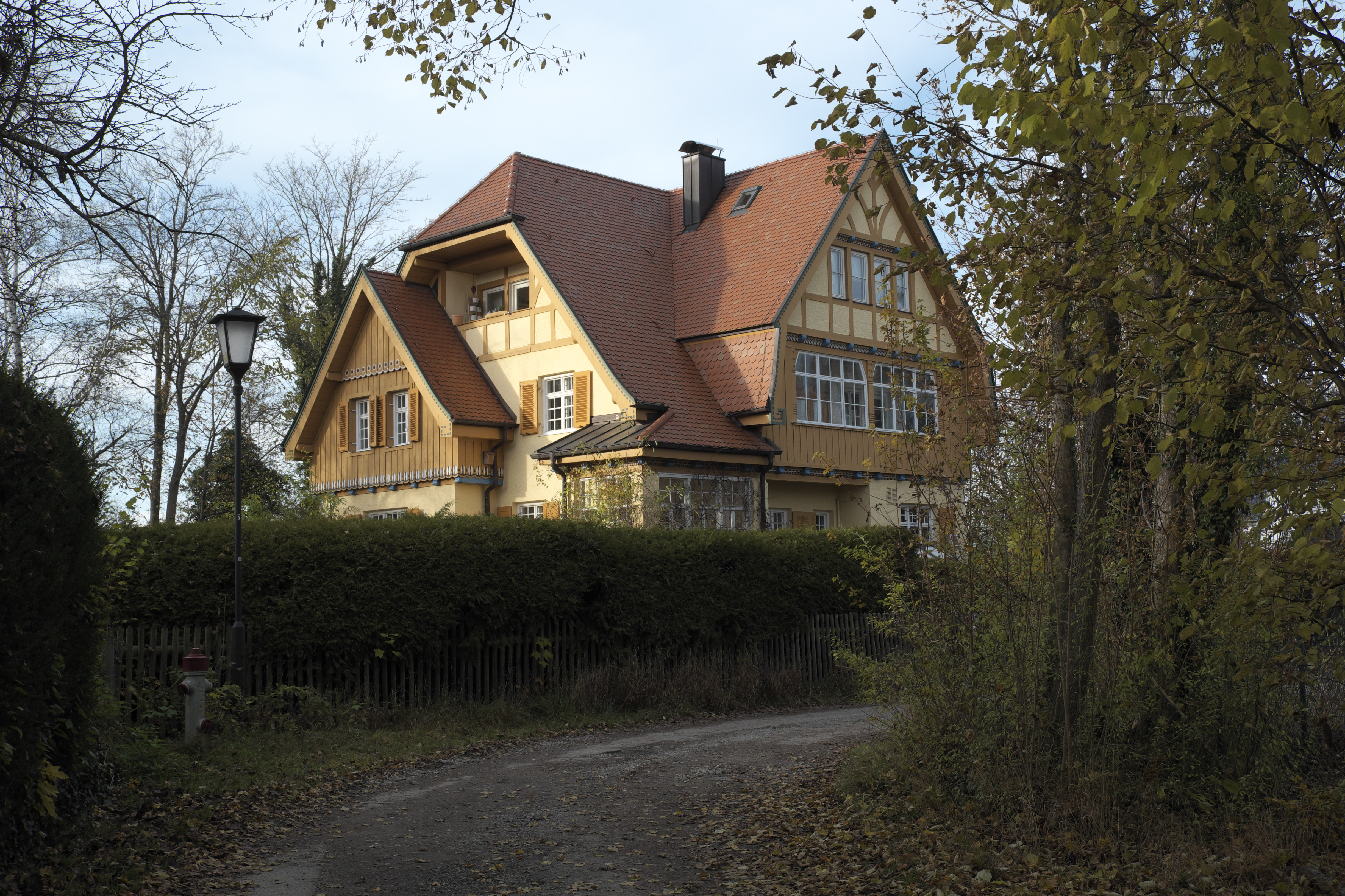 Villa Knittl in Feldafing im Landkreis Starnberg (Bayern/Deutschland)